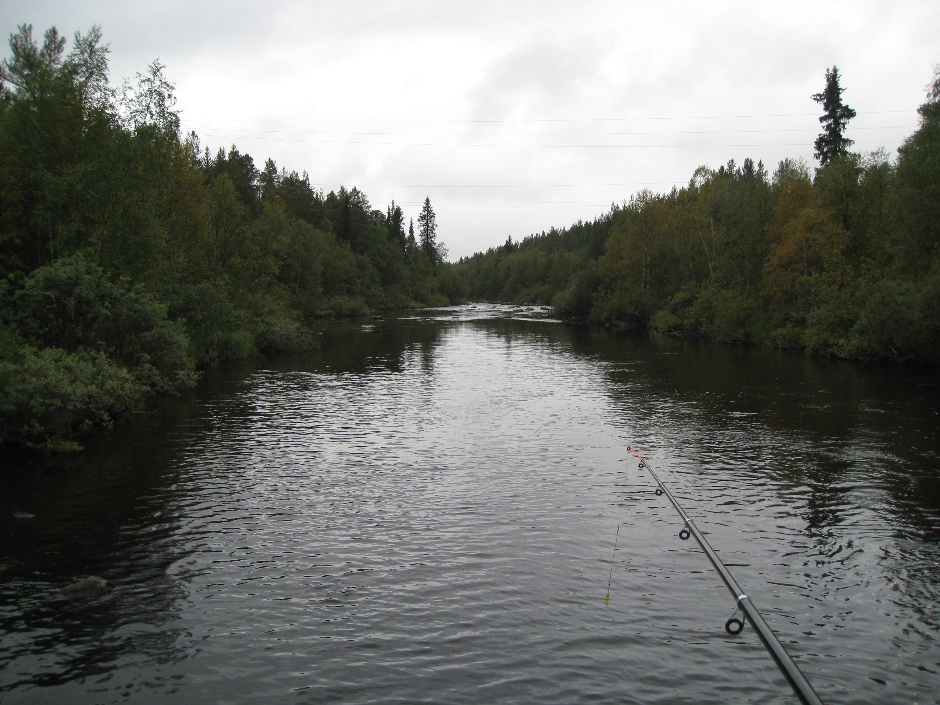 Река Куреньга